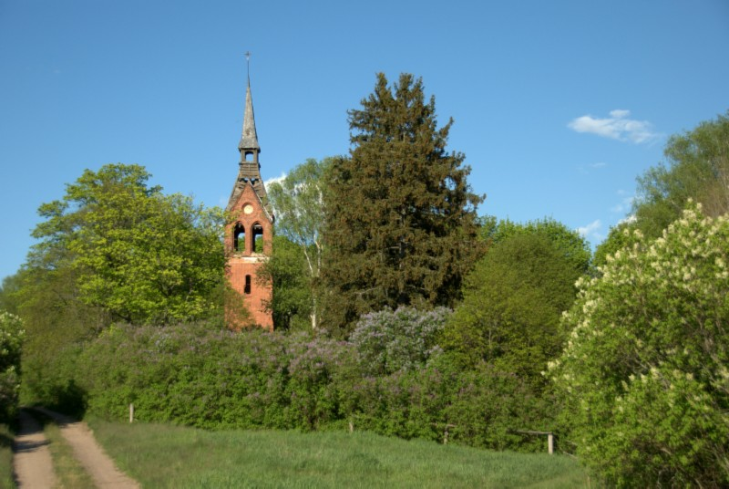 Rezerwat faunistyczny "Małga" - wieża zrujnowanego kościoła ewangelickiego